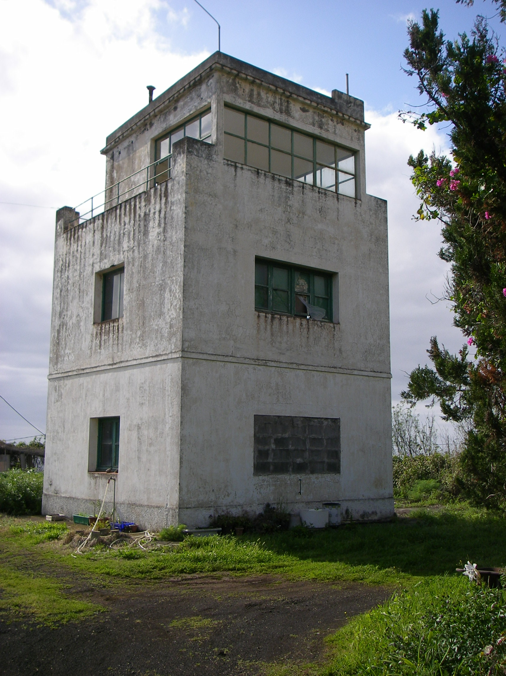 Der alte Tower des stillgelegten Flughafens von La Palma